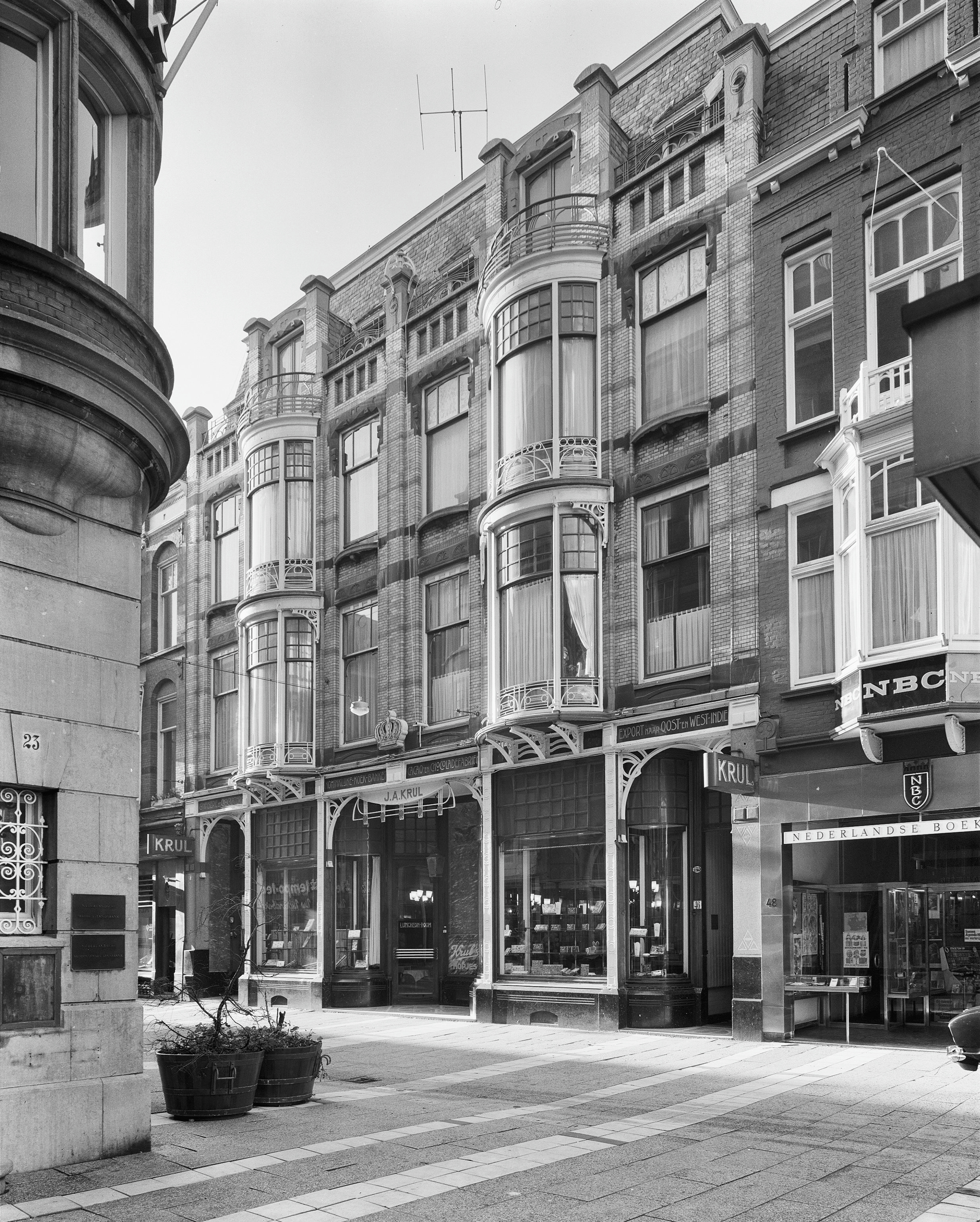 Maison Krul, exterieur